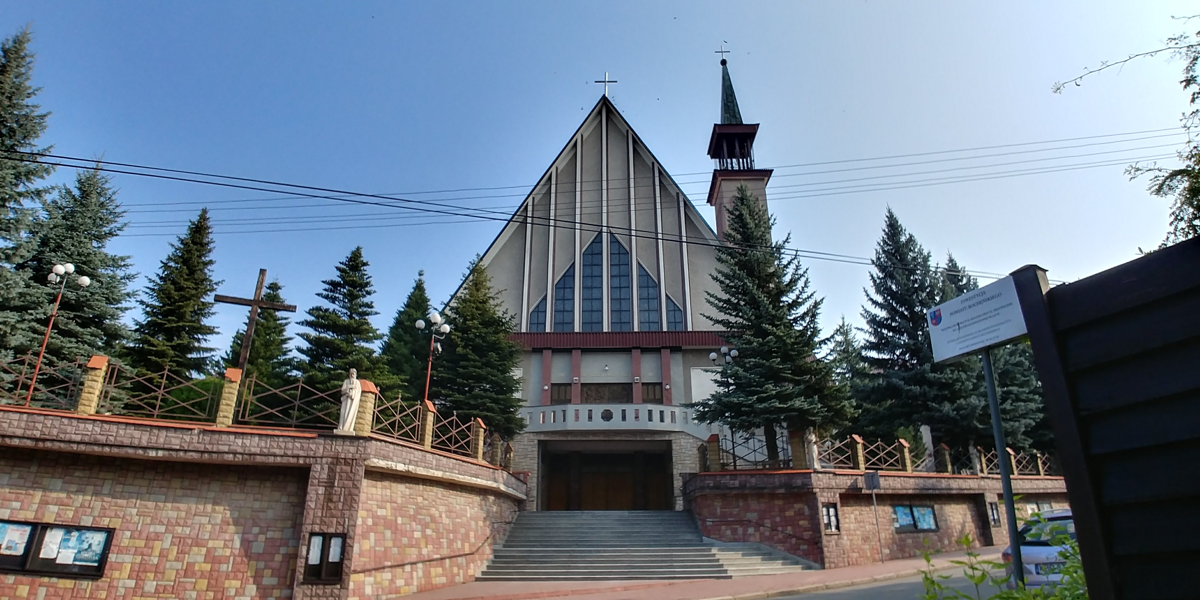 Parafia św. Jana Nepomucena w Bochni.